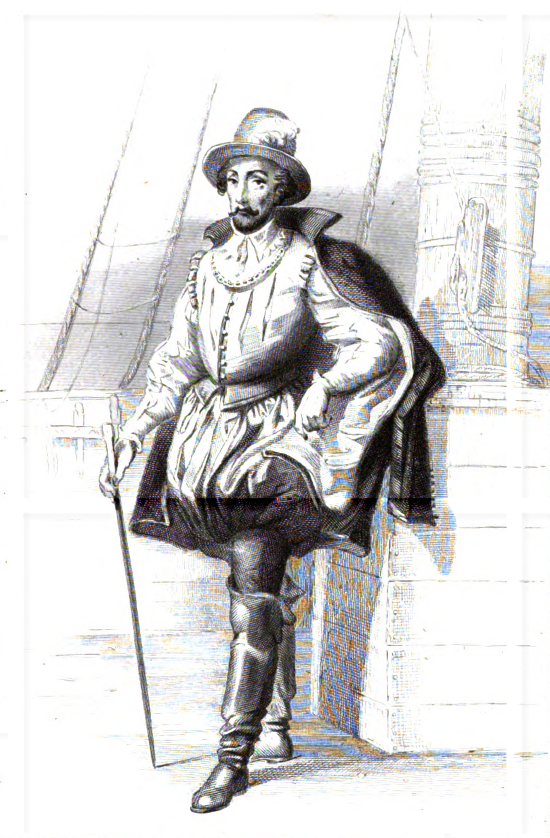 René Goulaine de Laudonnière